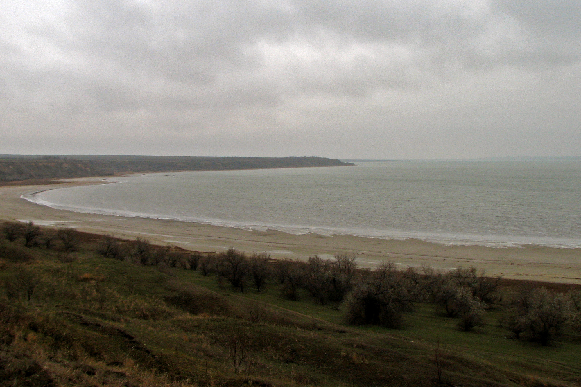 Kuyalnicki liman